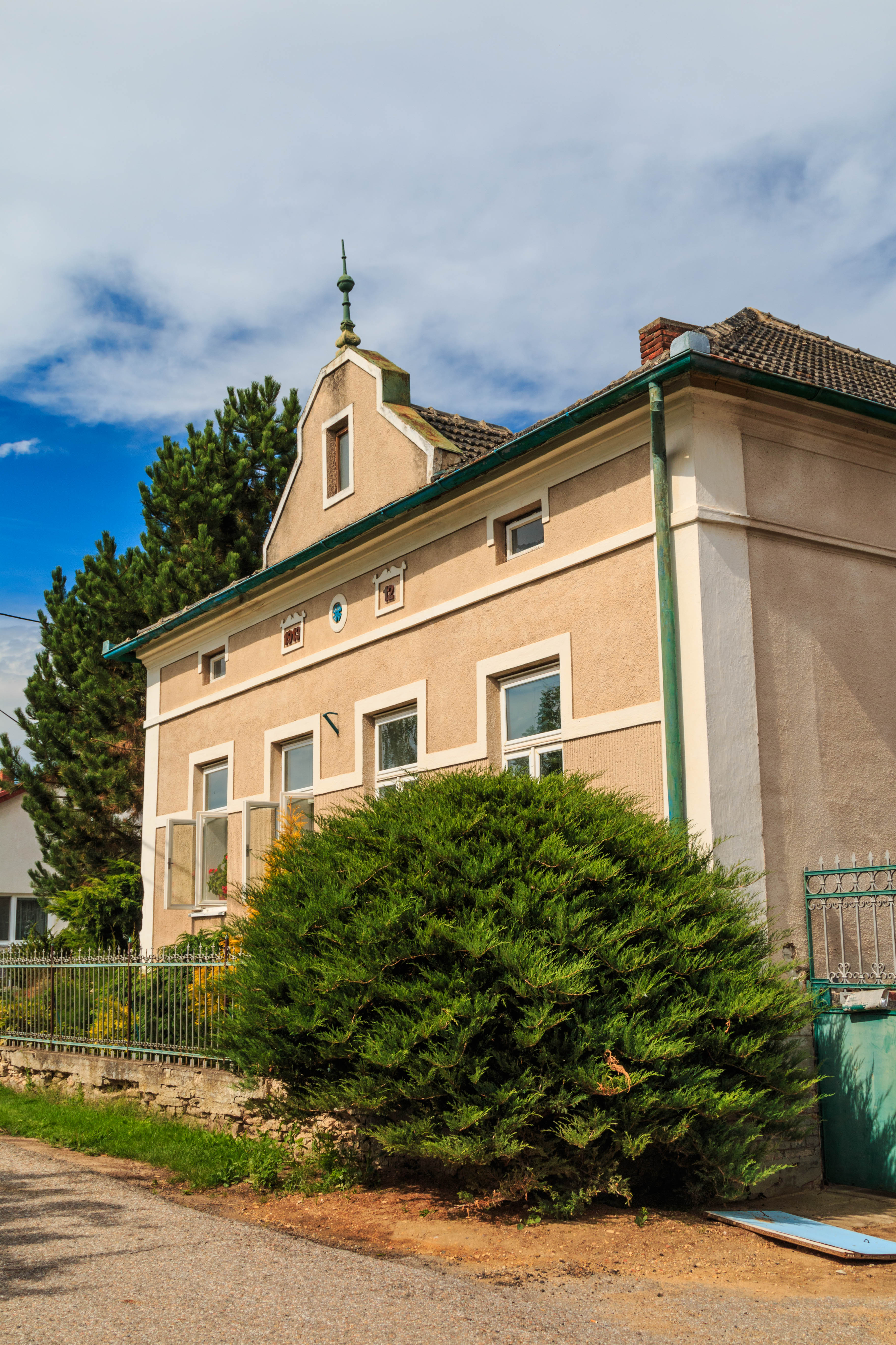 Bělešovice čp. 12